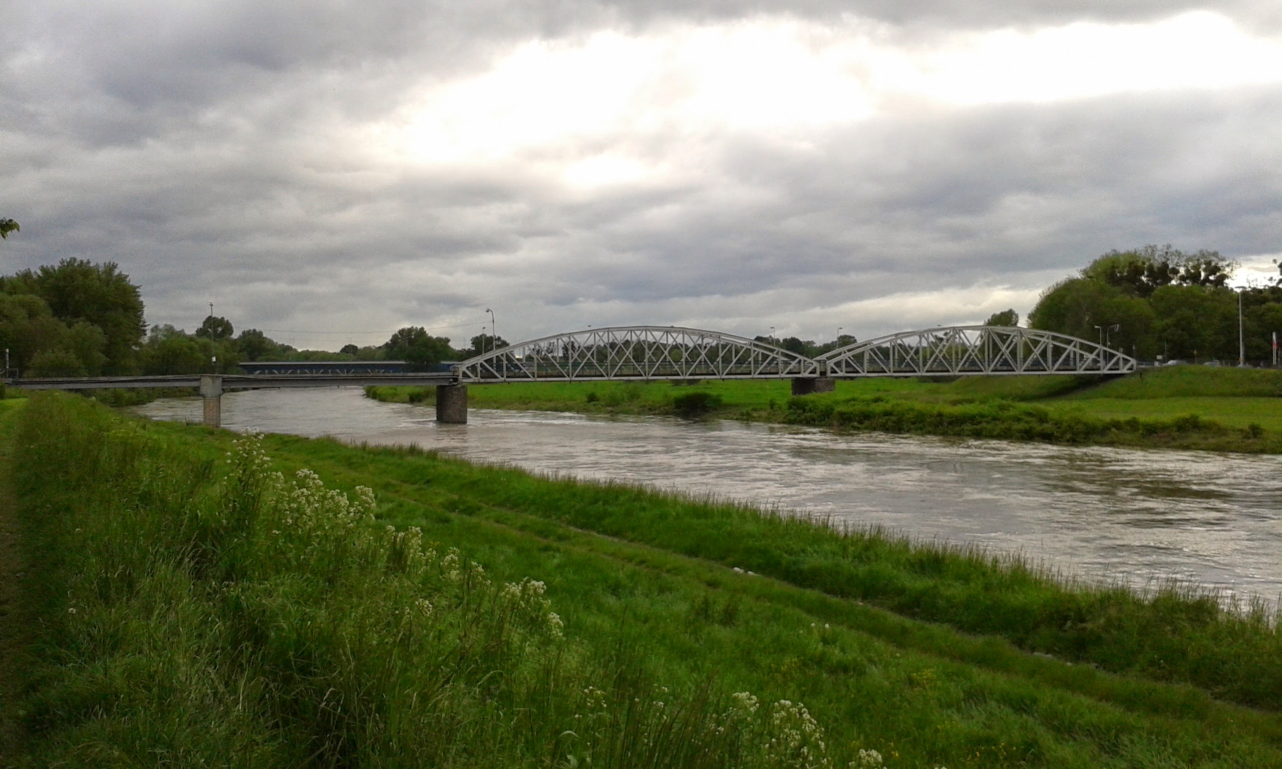 Most graniczny nad Odrą w Starym Boguminie